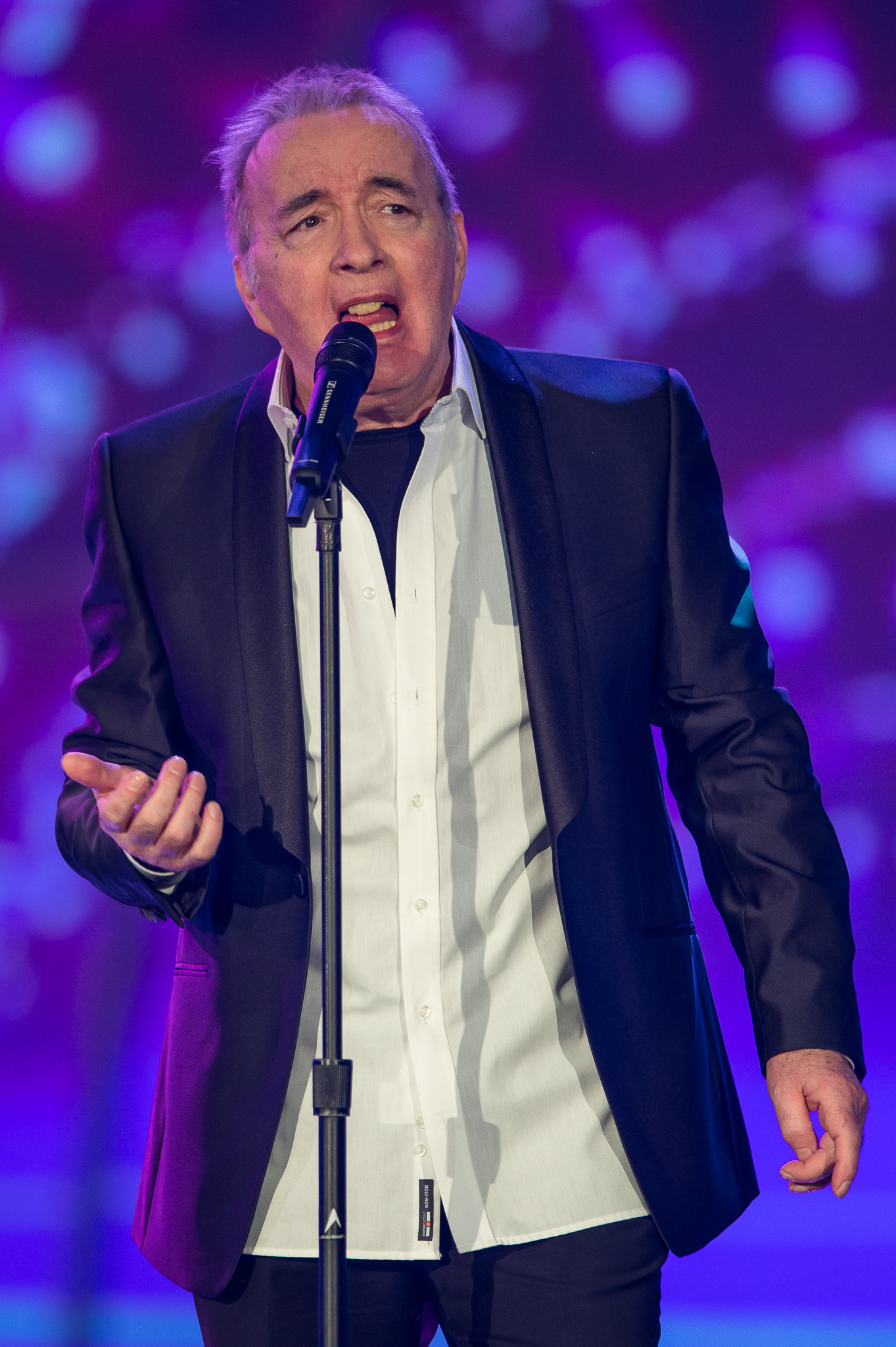 BR,Barry Ryan,Bayerisches Fernsehen,Frankenhalle,Live-Sendung,Sternstunden-Gala,Sternstundengala